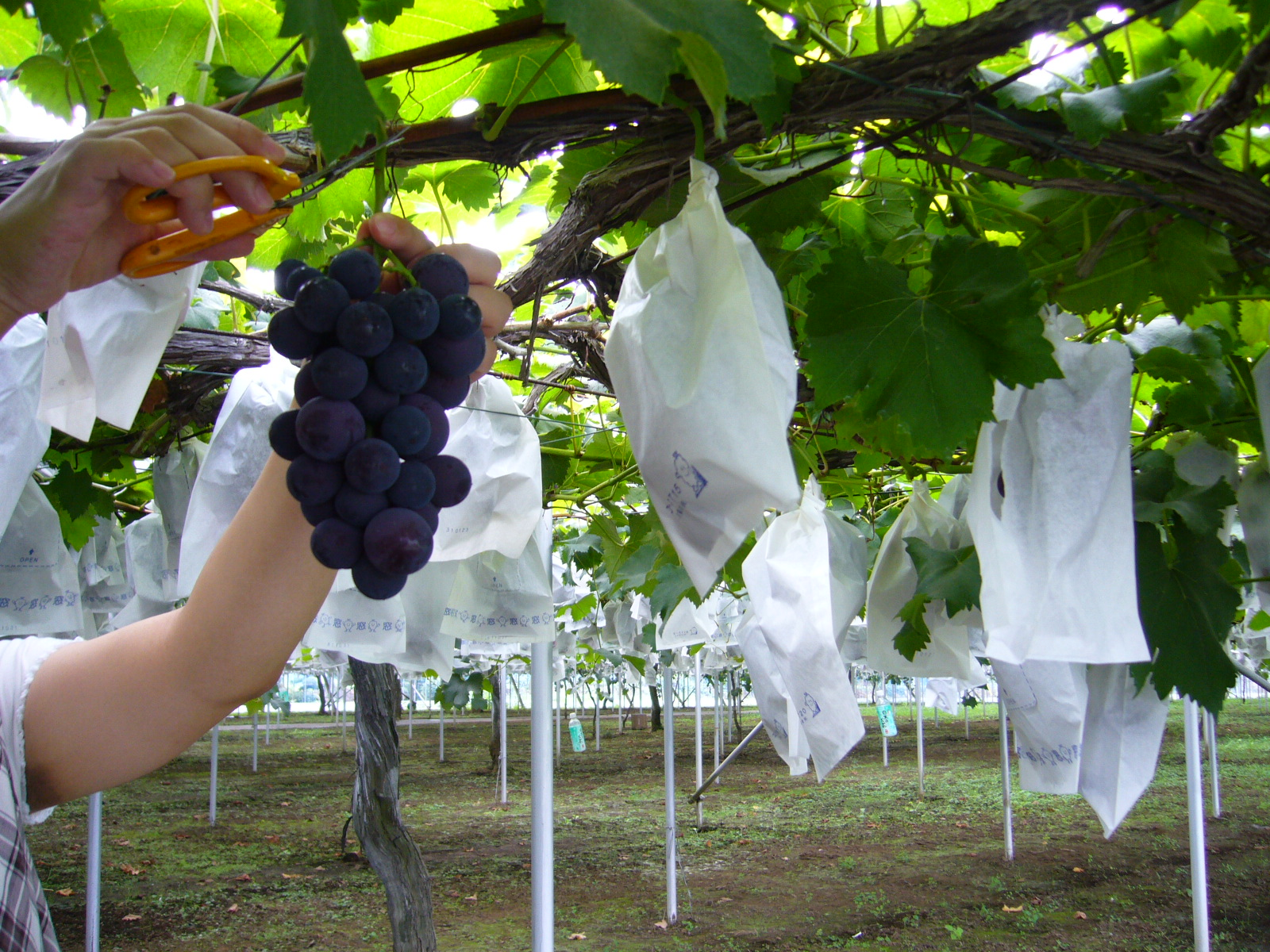 vineyard,katori-city,japan